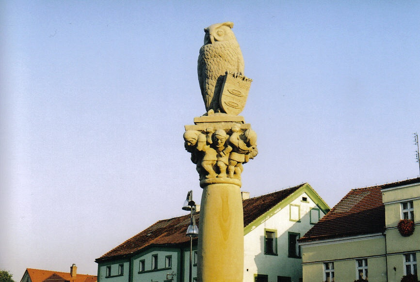 Sowa w Bielawie, autor zdjęcia Wikipedysta:Adam1993,2005